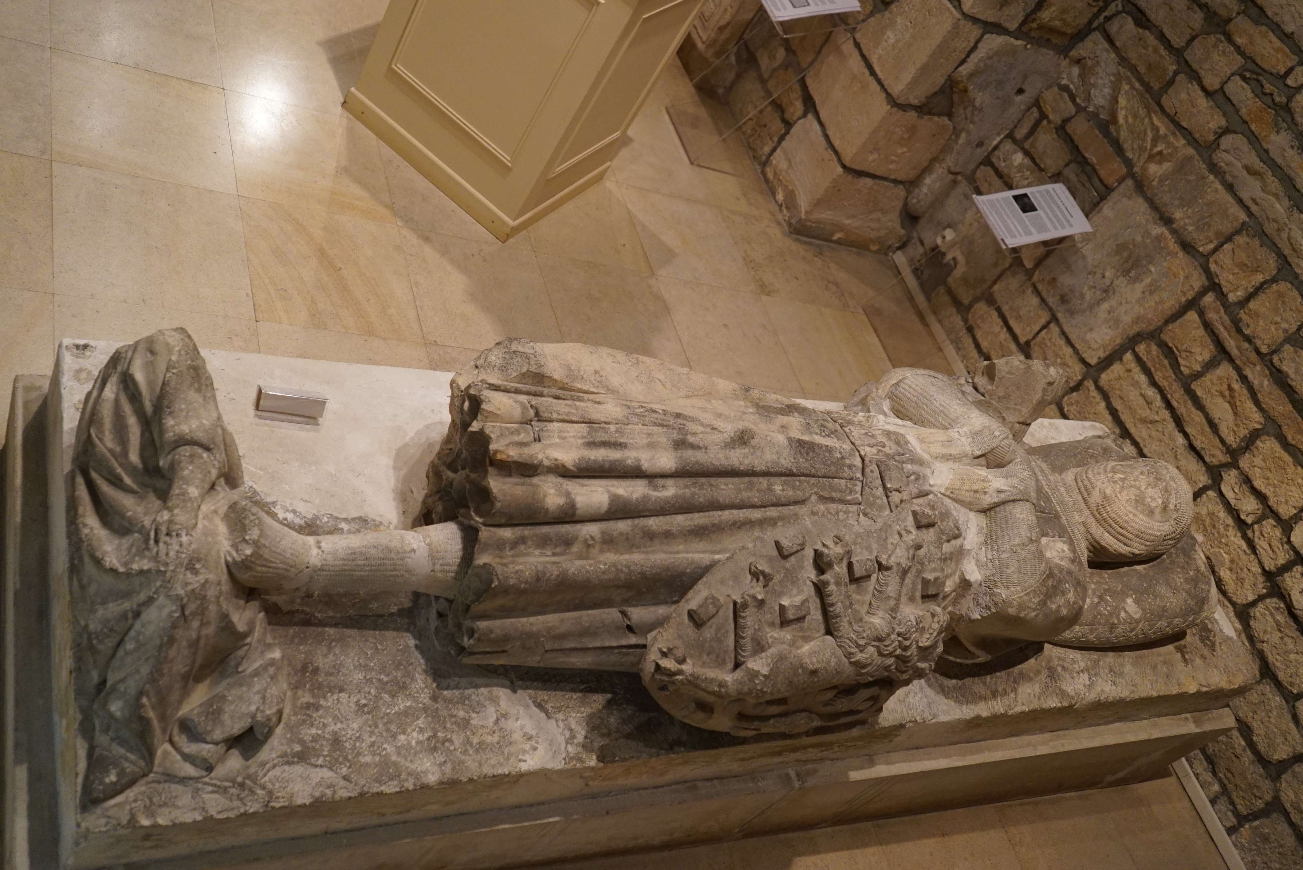 présenté au musée.